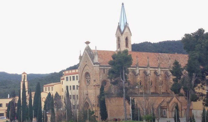 El Carme